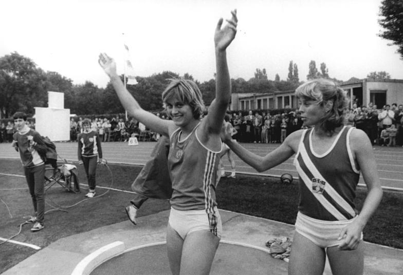 Sabine Busch, Susanne Losch ADN-ZB Koard 22.9.85 Berlin: Leichtathletik-Sportfest - Die Erfurterin Sabine Busch (l.) freut sich über ihren Weltrekord über 400 m Hürden in 53,56 s. Ihre Klubkameradin Susanne Losch vom SC Turbine Erfurt teilt die Begeisterung. Die Hürdenläuferin erang ihren großen Sieg beim Wettbewerb der besten DDR-Leichtathleten im Berliner Sportforum. Abgebildete Personen: Busch, Sabine: Leichtathletin, Hürdenläuferin, DDR